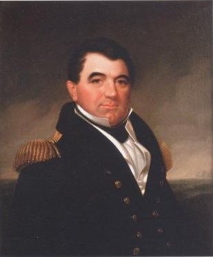 Retrat de Jordi Ferragut Mesquida (Ciutadella, Menorca, 28 o 29 de setembre de 1755 - Point Plaguet, Pascagoula, Mississipí, 4 de juny de 1817) fou un militar